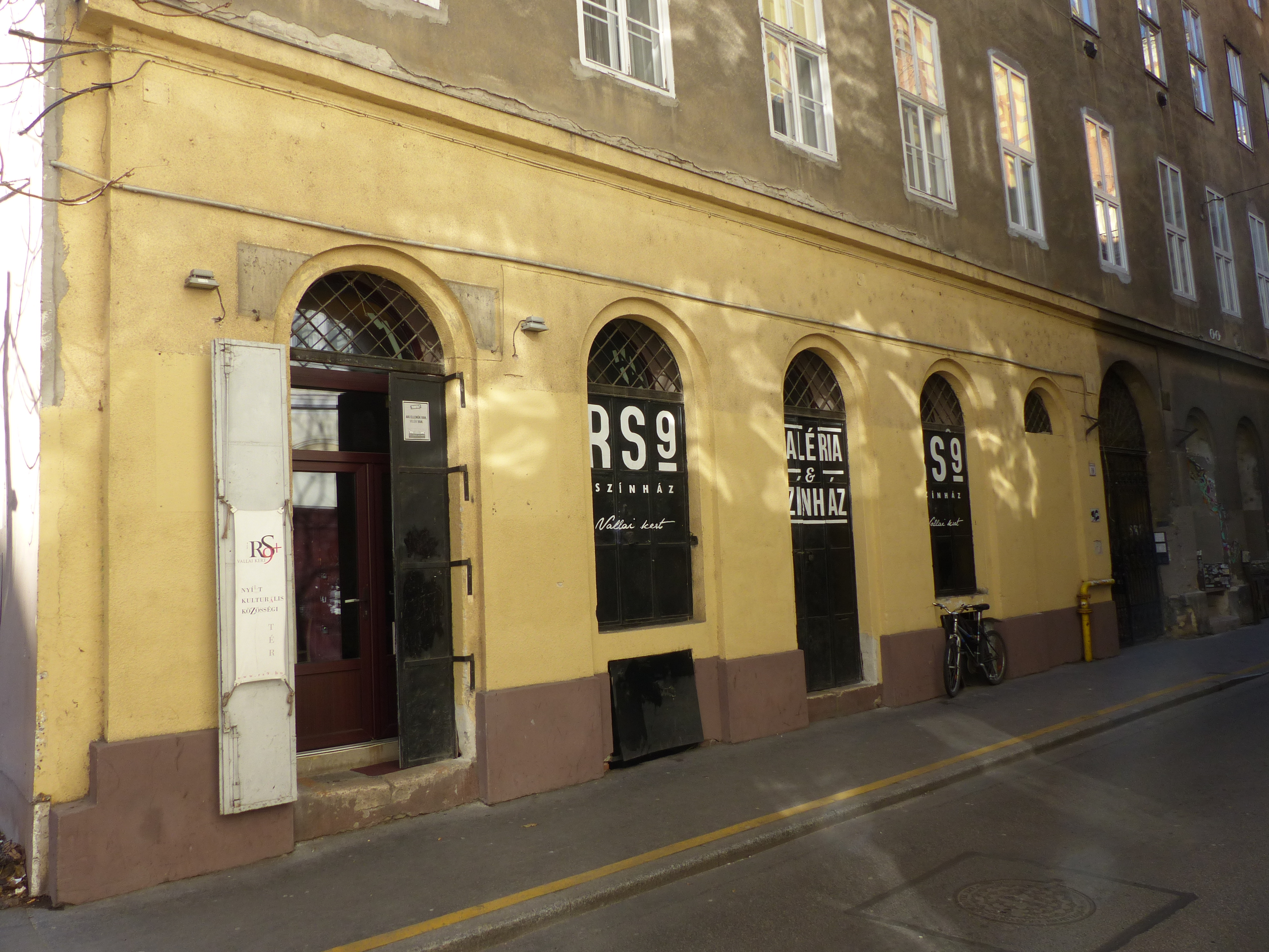 A felvétel 2016. december 27-én készült a Rumbach Sebestyén utcában. 9 szám, PS9 Galéria és Színház. Vallai Péter (5). Az 5,6,7 alatti képek vágottak. Eredeti képek megjelentek a Yotel DVD sorozatban. Dobay Dezső kezdeményezésére 2013. november 25-én – Vallai Péter 66-ik születésnapján – alapították meg a Vallai Péter Kortárs Előadóművészeti Alapítványt. Ezzel egy időben nyílt az RS9 Színházzal szerves egységben működő RS9 + Vallai Kert. Másodszor rendezték meg 2016. november 25-27-én az RS9 Színházban és a Vallai Kertben a Vallai Fesztivált kortárs lírai és prózai művek bemutatására. A háromnapos fesztivál az előzsűri által kiválasztott alkotásoknak nyilvánosságot teremt. A legjobb három előadás a négytagú szakmai zsűri (Kőváry Katalin rendező, Forgách András író, dramaturg, Stermeczky Zsolt Gábor kritikus és Tompa Andrea, kritikus) döntése alapján díjazásra kerül.